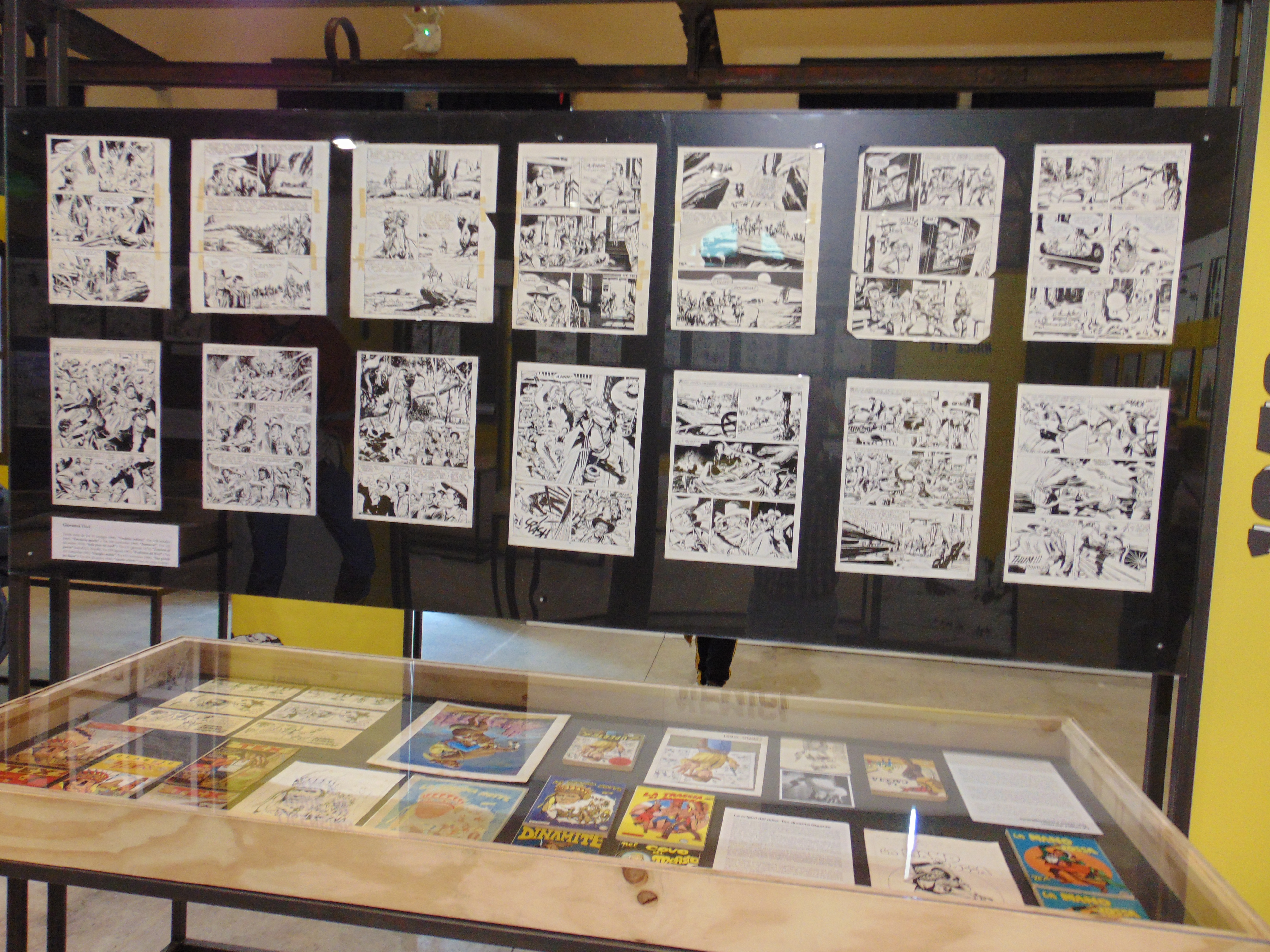 Tex - 70 anni di un mito @ Arf! Festival 2019